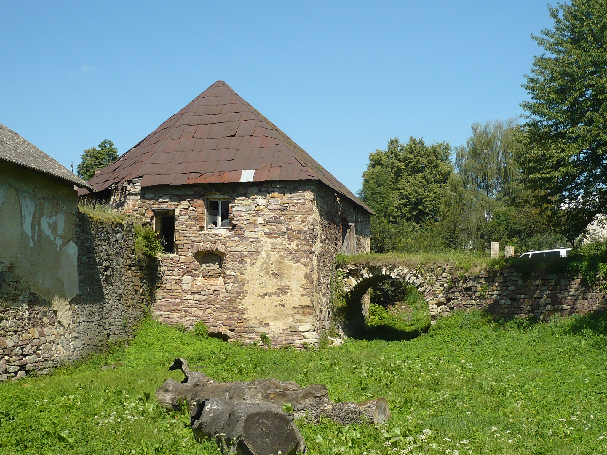 Potok Złoty. Zamek